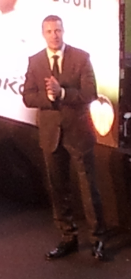 Amadeo Salvo a la presentació de Dorlan pabón en Mestalla